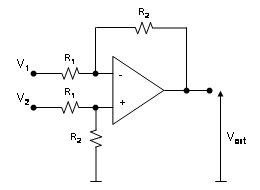 Schéma d'un amplificateur d'instrumentation à 1 AOP - je suis l'auteur